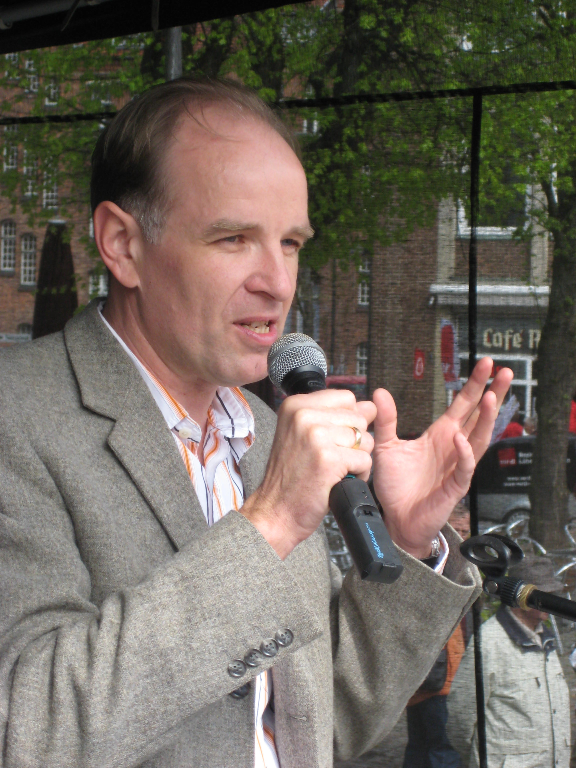 Ralf Meister am Ersten Mai 2008 auf dem Markt bei seiner Ansprache während der Kundgebung des DGB